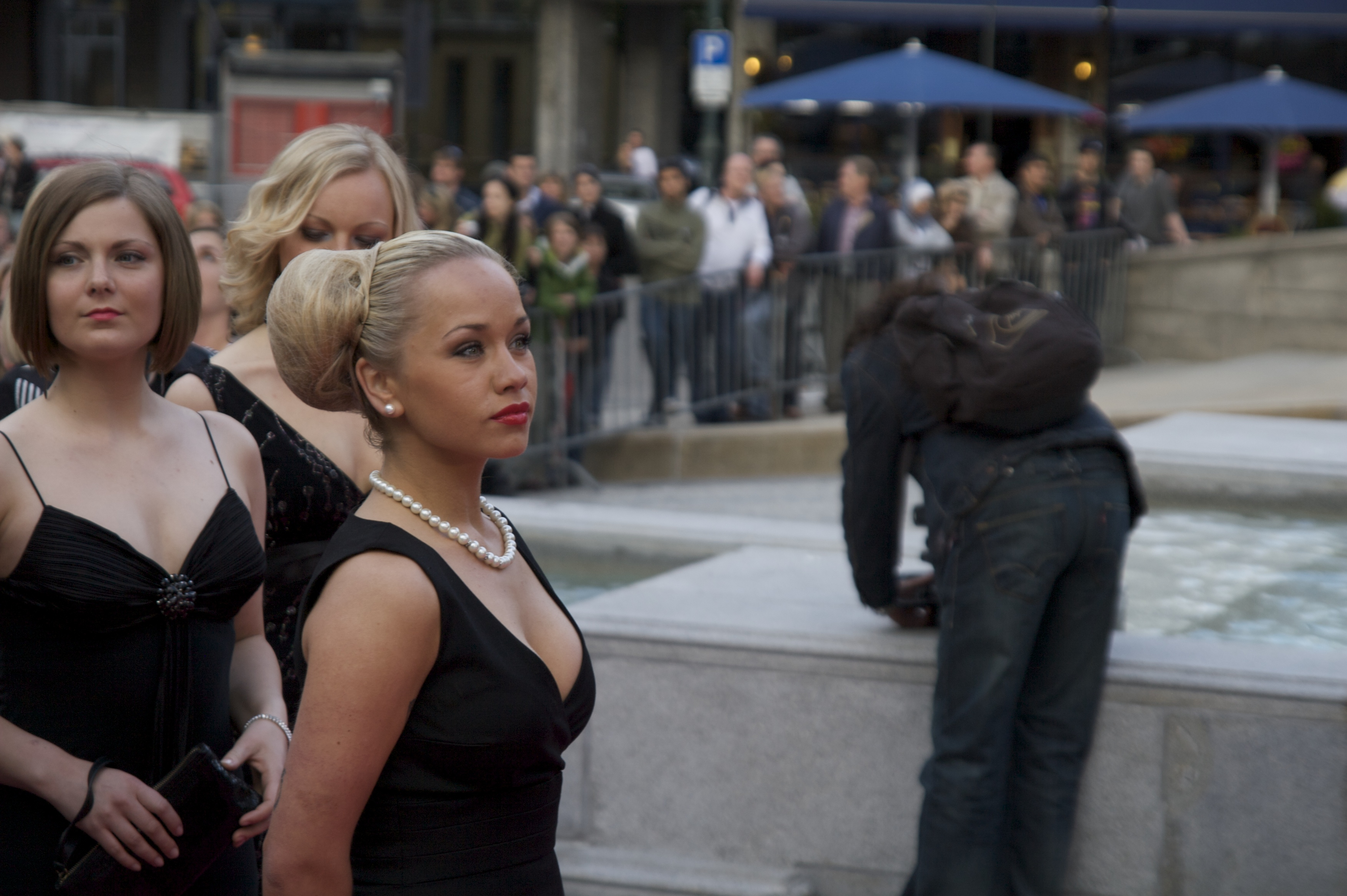 Foto: Vincent Hasselgård, Aktiv I Oslo.no